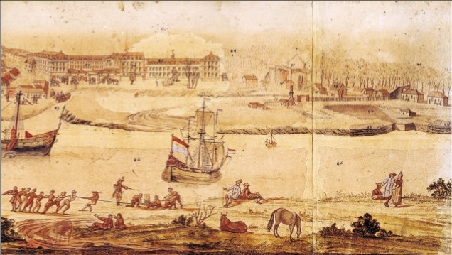 Vue cavalière de l'arsenal de Rochefort par Gérard Edelinck, en 1724. Originala au Musée municipal de Rochefort (17).